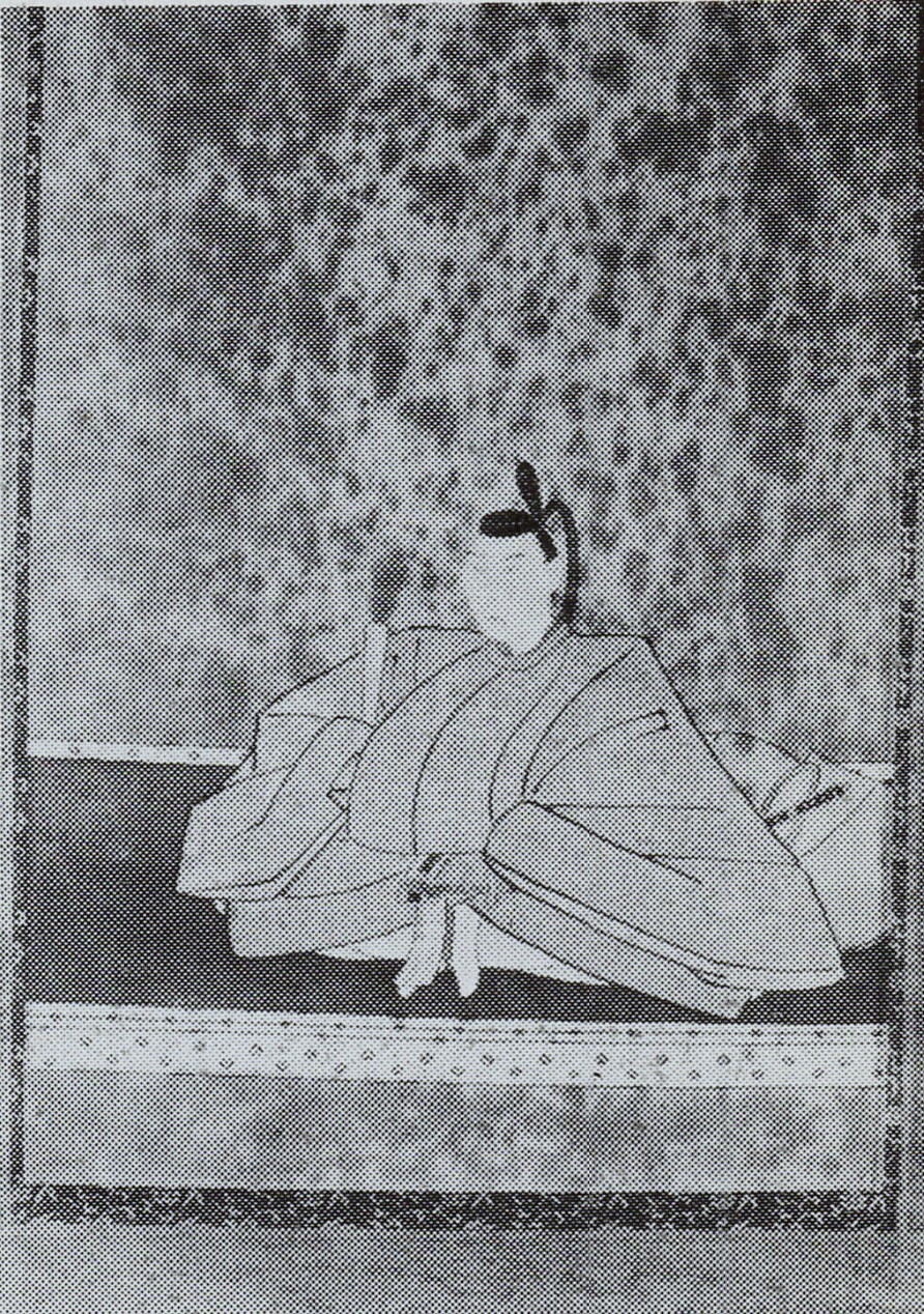 相良福将の肖像(モノクロ)。